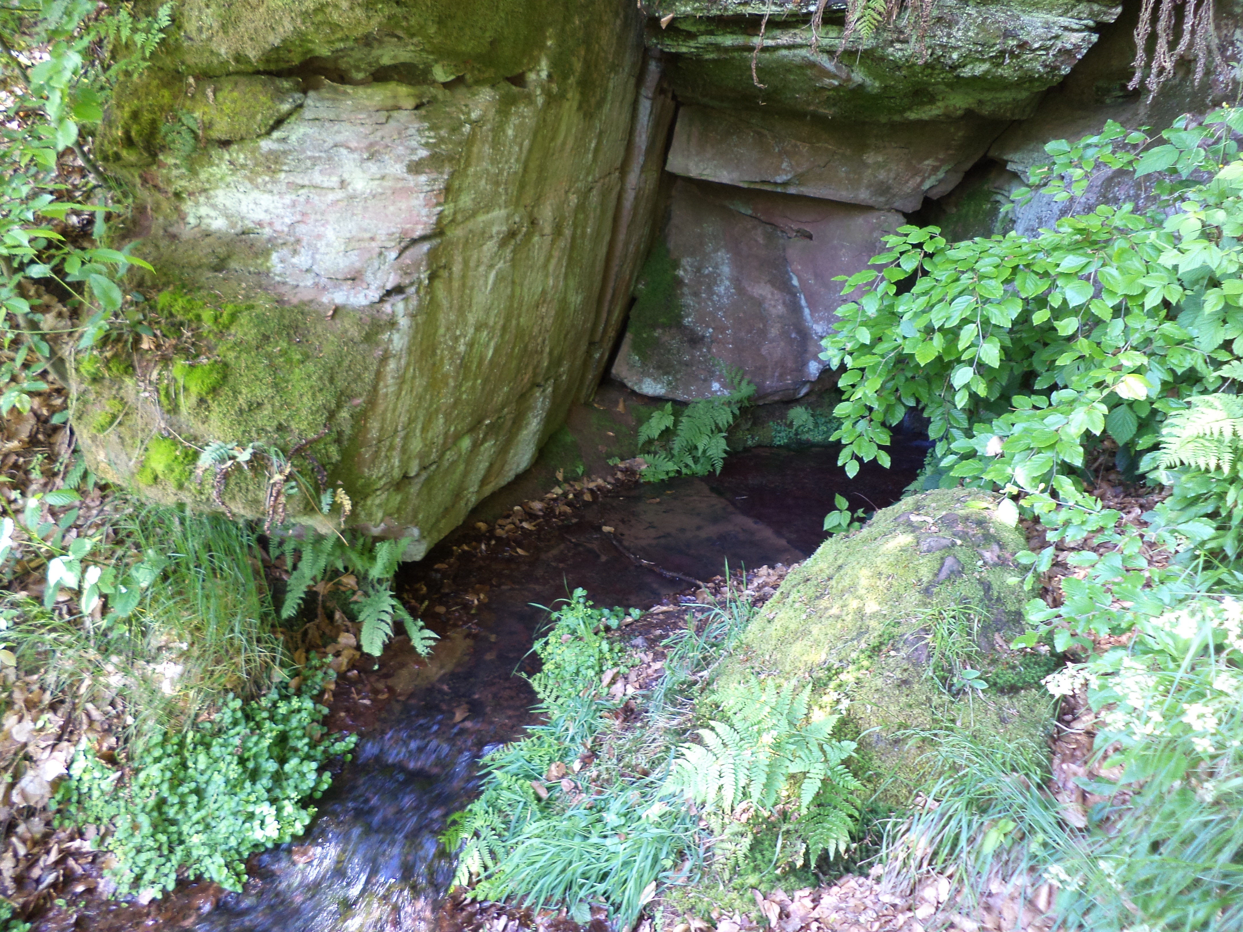 Der Quellaustritt der Zittenfeldener Quelle (ND) im Mai 2013